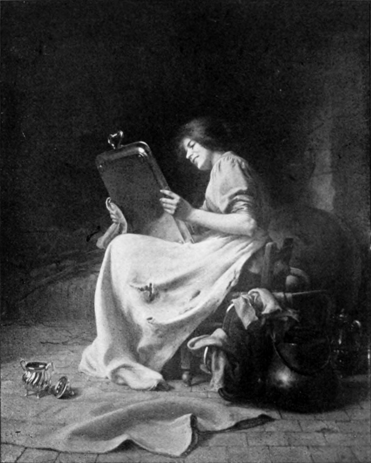 Cendrillon